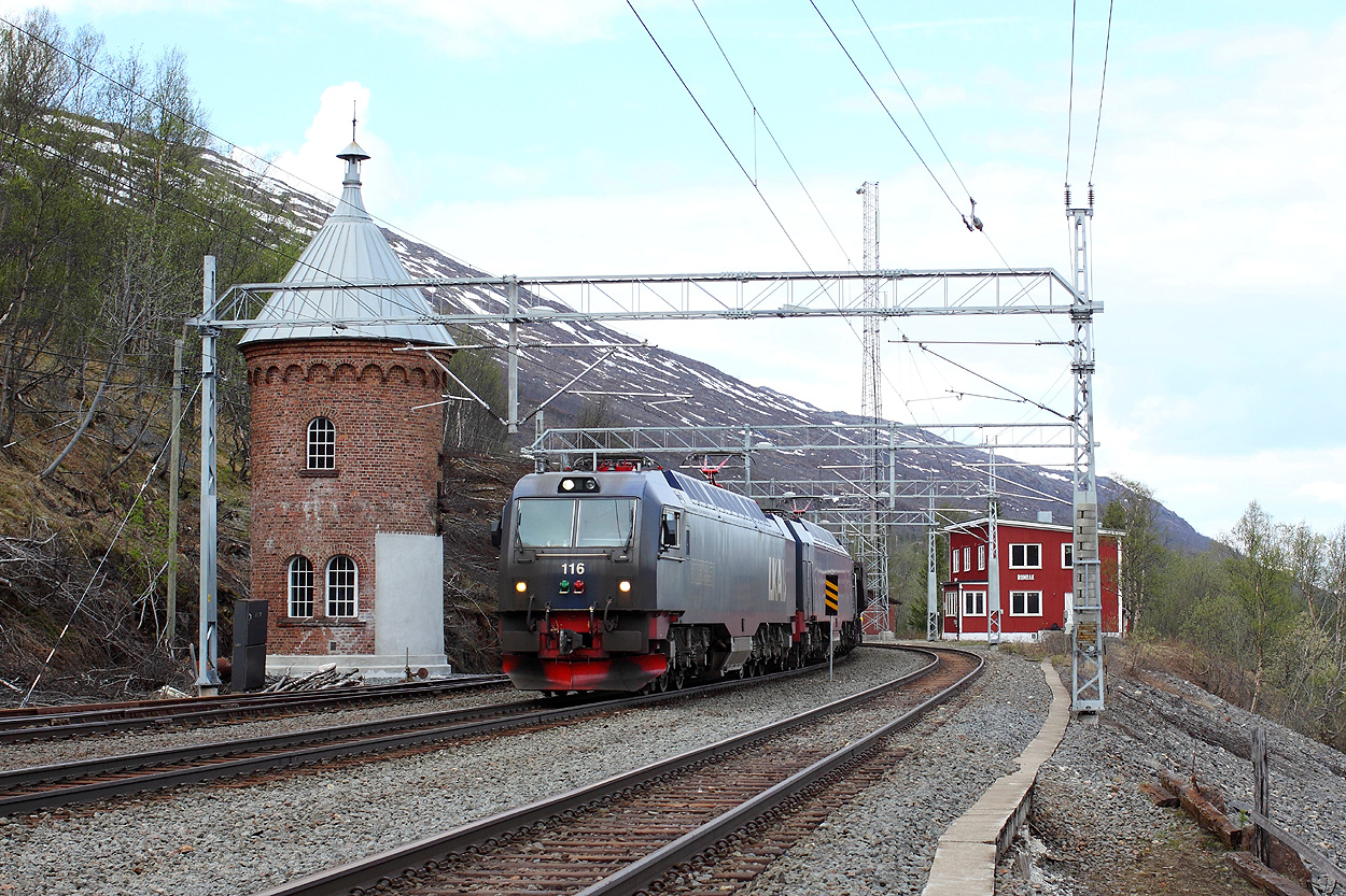 IORE 116 STORDALEN - 2010-05-29 - Rombak